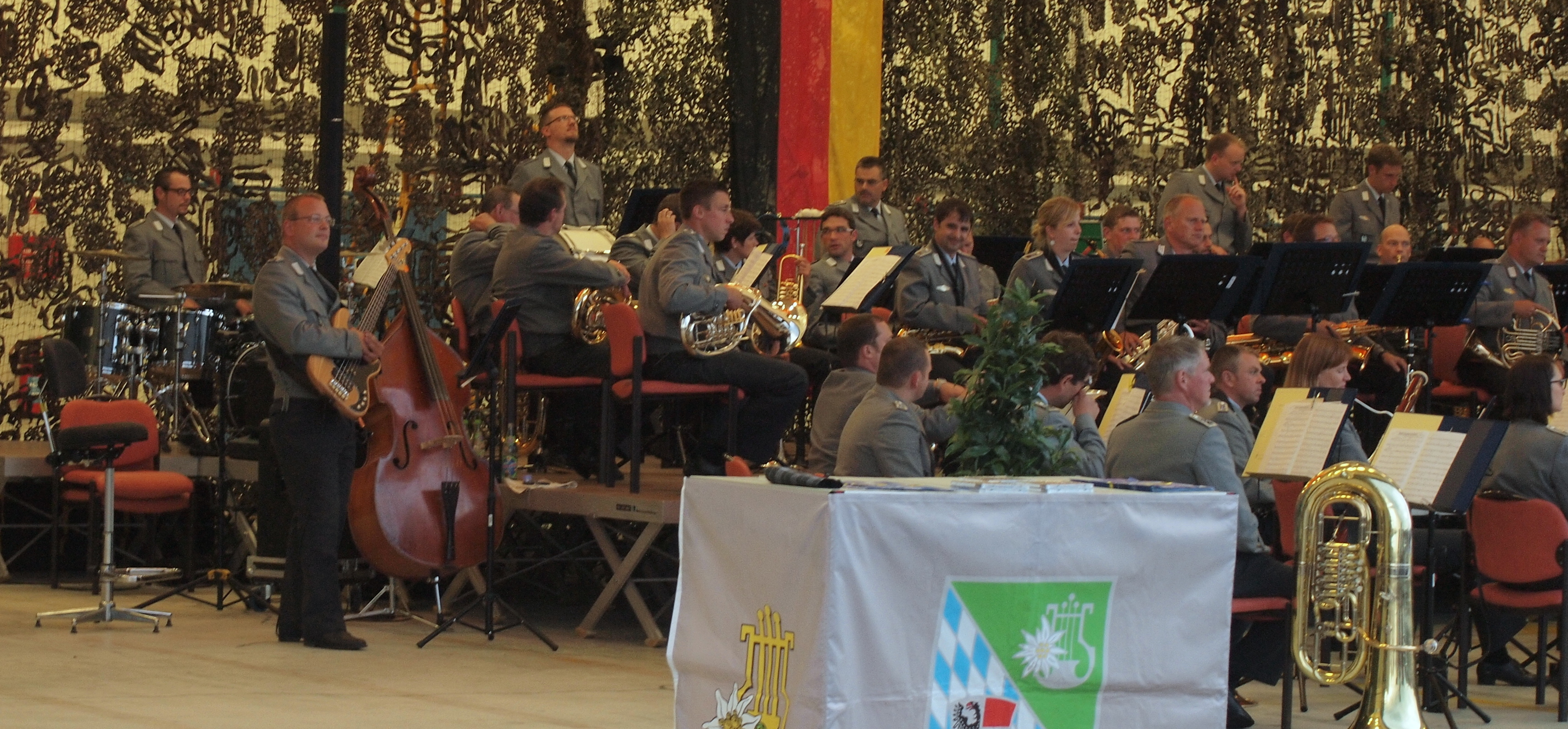 Gebirgsmusikkorps der Bundeswehr (GebMusKorpsBw) auf dem Flugplatzkonzert in Halle 307 des Fliegerhorst Kaufbeuren